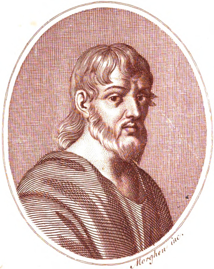 Ritratto di Acrone di Agrigento, dal libro "Biografia degli uomini illustri di Sicilia", di Giuseppe Emanuele Ortolani.